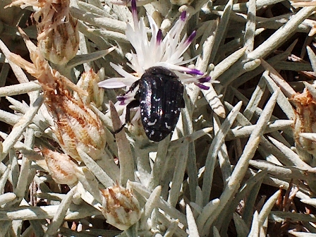 Centaurea horrida from Capo Falcone, Sardinia, Italy